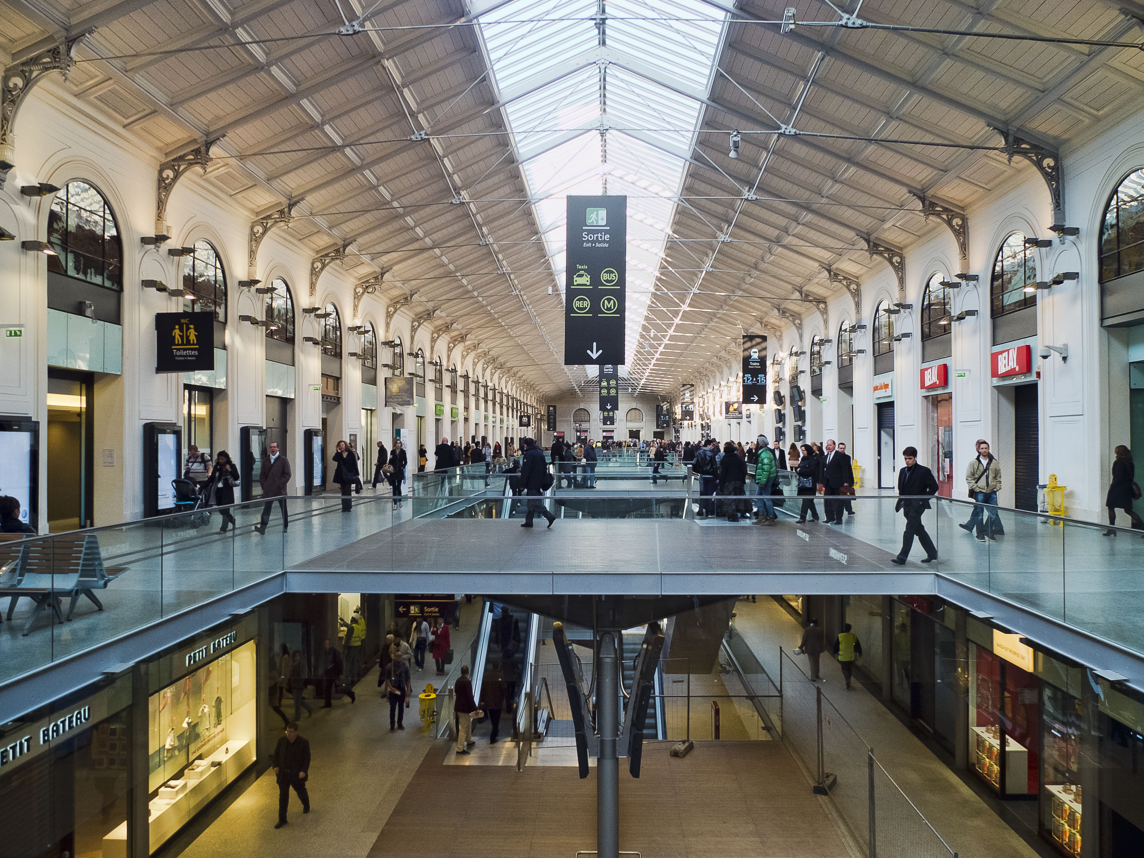 Hall de la gare Saint-Lazare (Paris), après rénovation